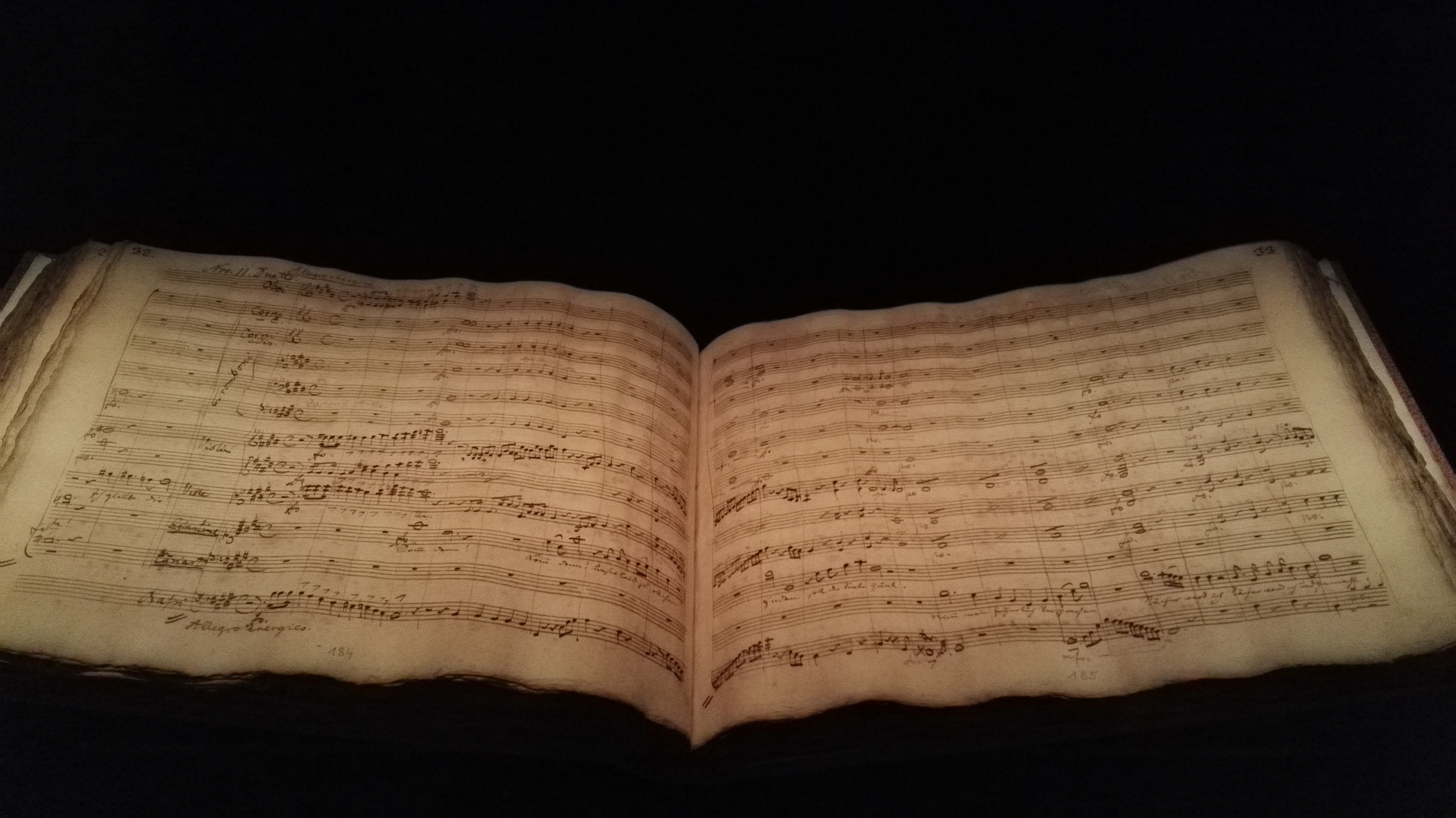 Partitur der Oper Euryanthe von Carl Maria von Weber im Buchmuseum Dresden